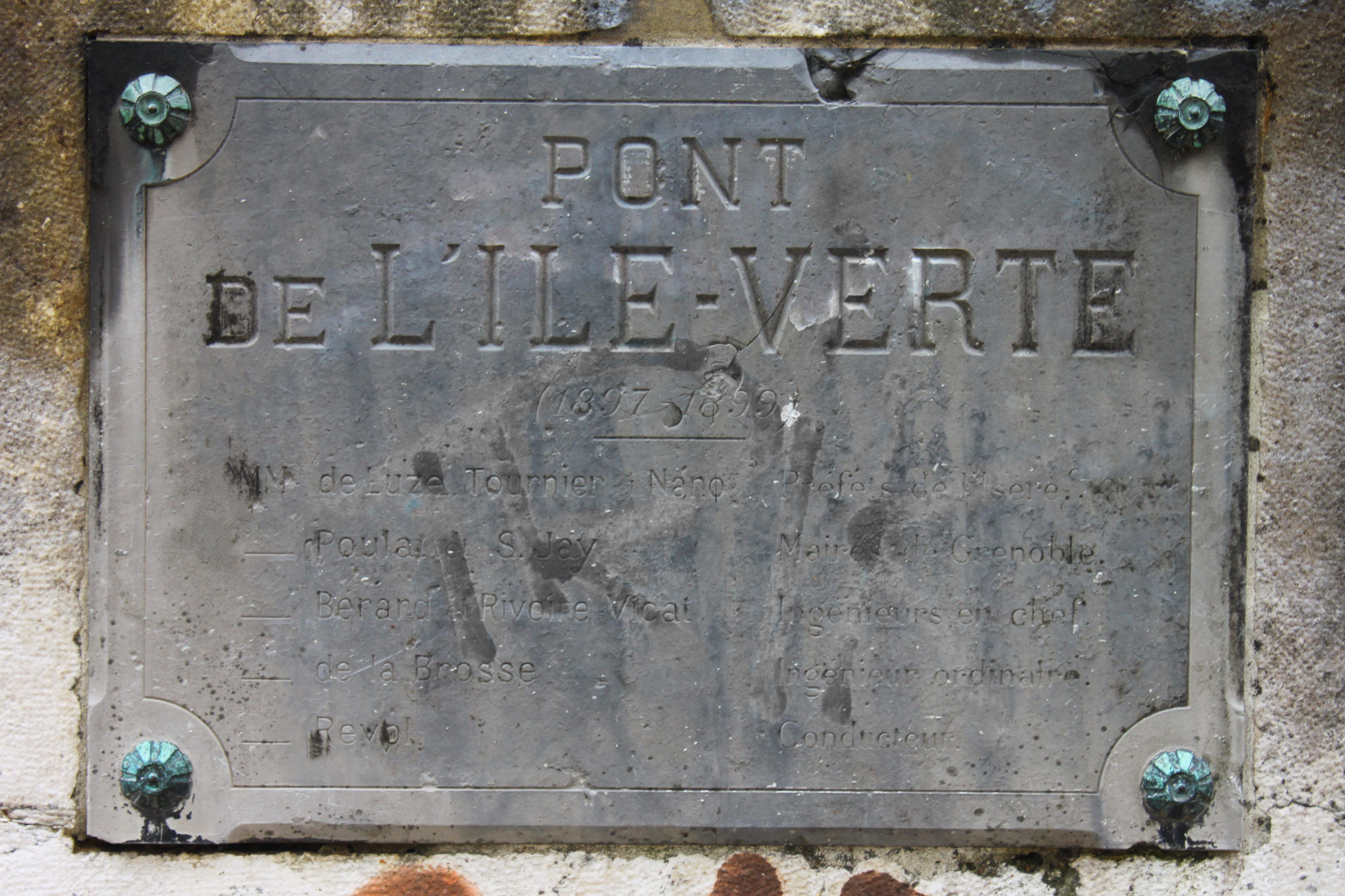 Plaque de l'ancien pont de l'Île-Verte à Grenoble construit entre 1897 et 1899. Elle est conservée depuis le remplacement du pont en 1989 Quai Yermoloff (La Tronche), non loin du nouveau pont. Préfets de L'Isère : MM. de Luze, Tournier et Nanot (dit Nano) Maires de Grenoble : Félix Poulat et Stéphane Jay Ingénieurs en chefs : Berard et Rivoire - Vicat Ingénieur ordinaire : de la Brosse Conducteur : Revol